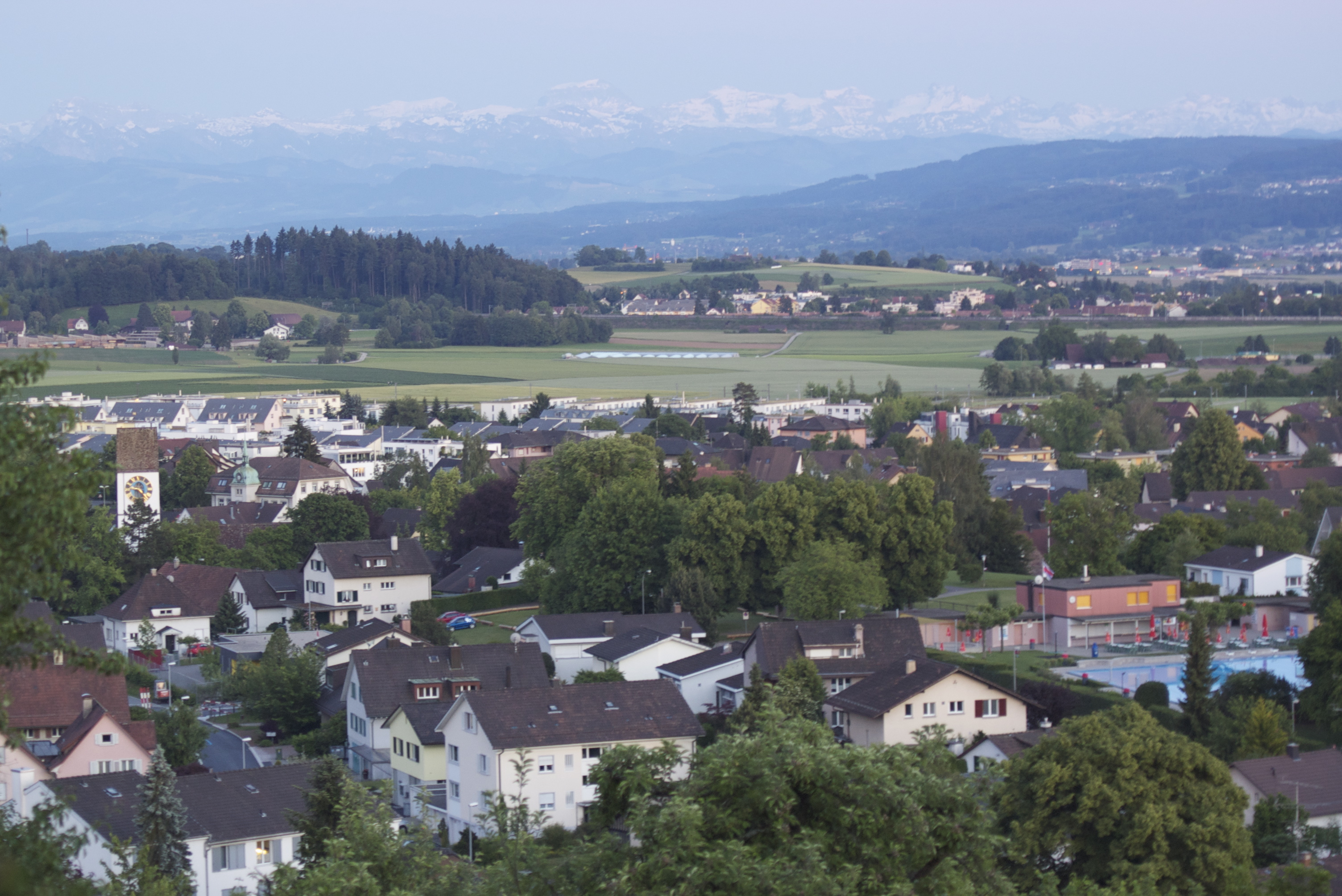 Blick von Ratzenhalden über den Hasenbühl, links der Turm der reformirten Kirche und das alte Primarschůlhaus; im Hintergrunde links Baltenswil, in der Mitte Brüttisellen, rechts Dietlikon, am Horizont die Glarner Alpen.